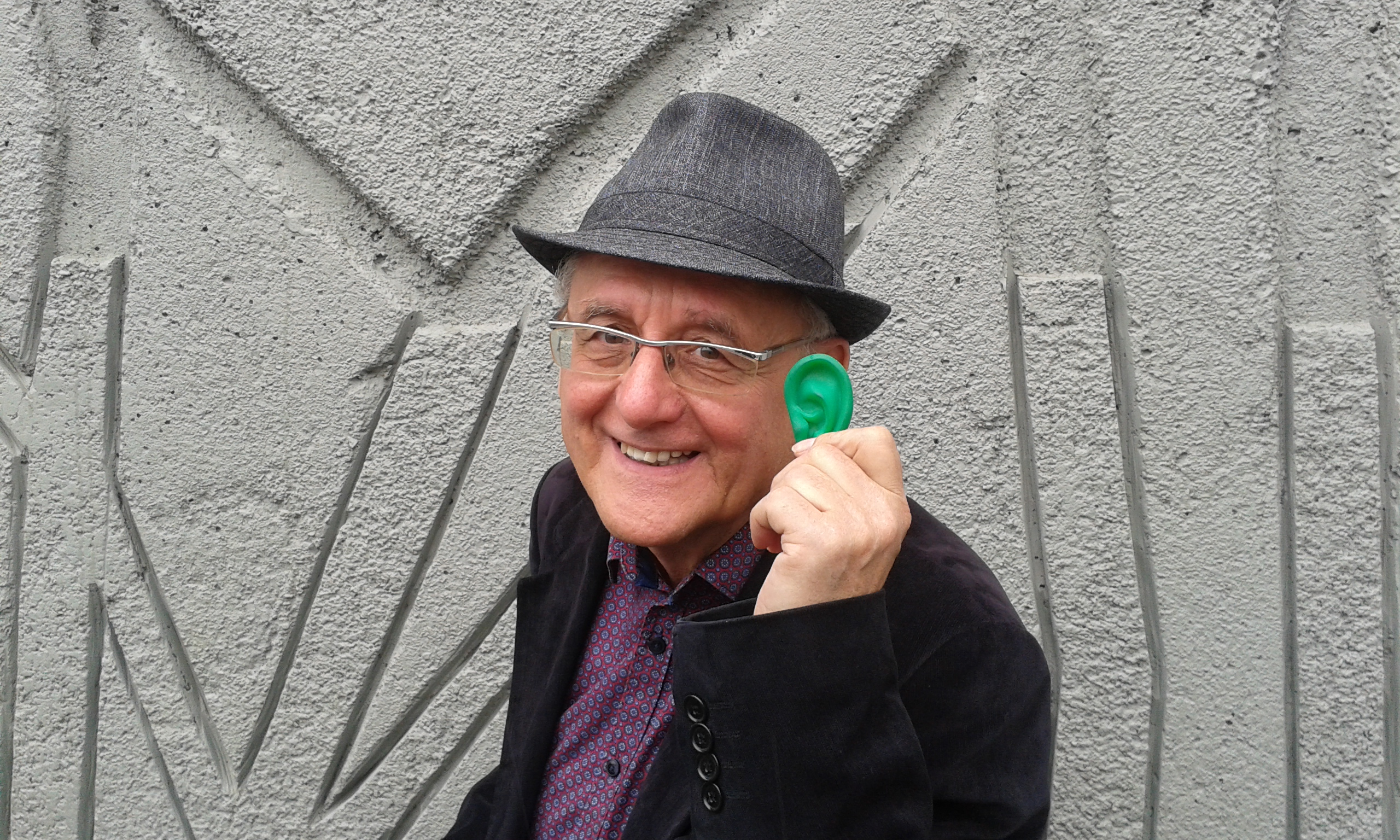 El cuentacuentos, escritor y artista Paco Abril con la Oreja Verde que siempre lleva en el bolsillo.